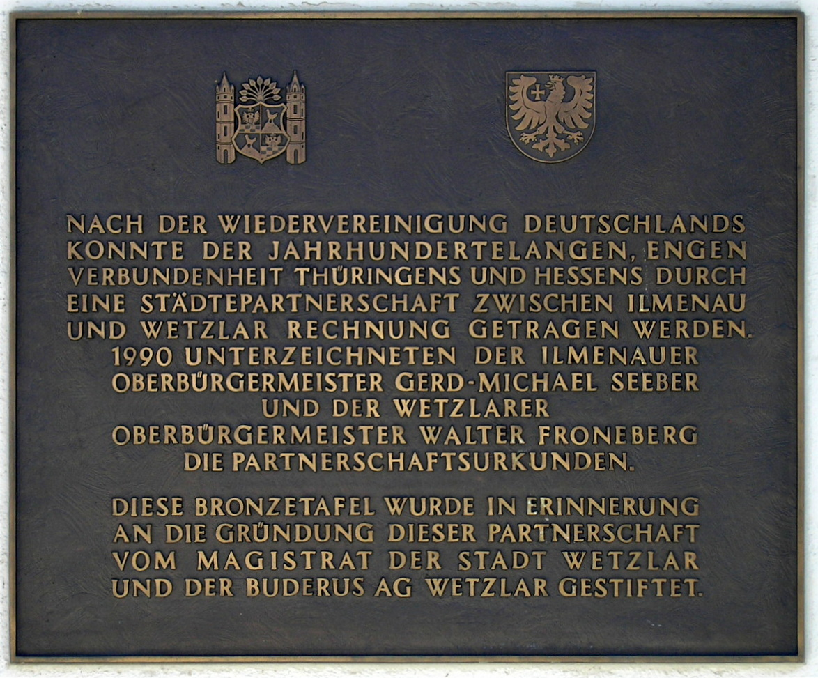 Gedenktafel anlässlich des Abschlusses der Städtepartnerschaft zwischen Ilmenau und Wetzlar am Wetzlarer Platz in Ilmenau (Thüringen).